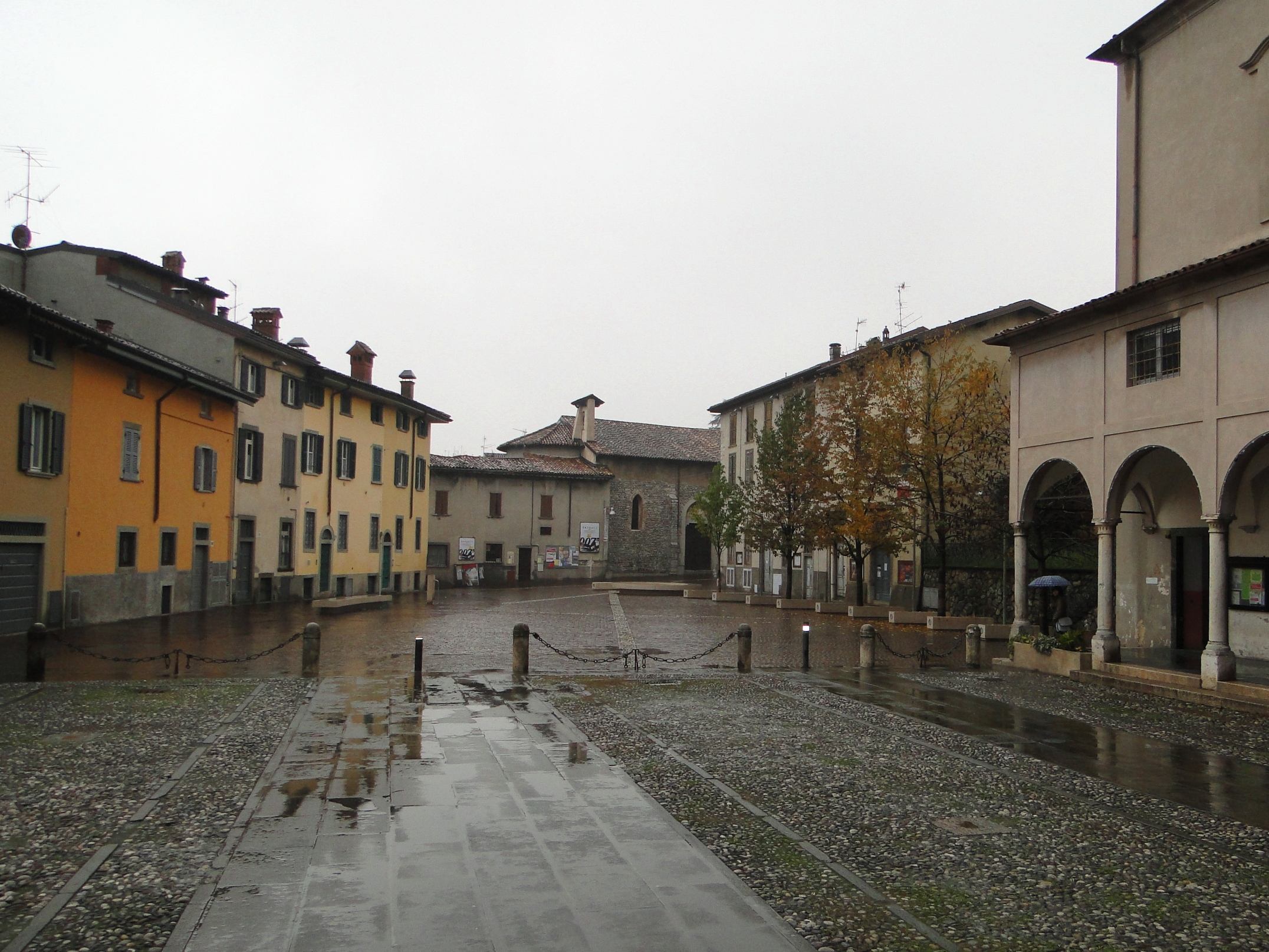 Albino (BG), Piazza San Giuliano